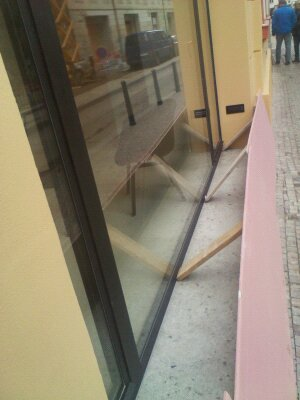 18. 11. 2016 ČKA realizovaná rekonstruuje podloubí do barokně-klasicistní podoby